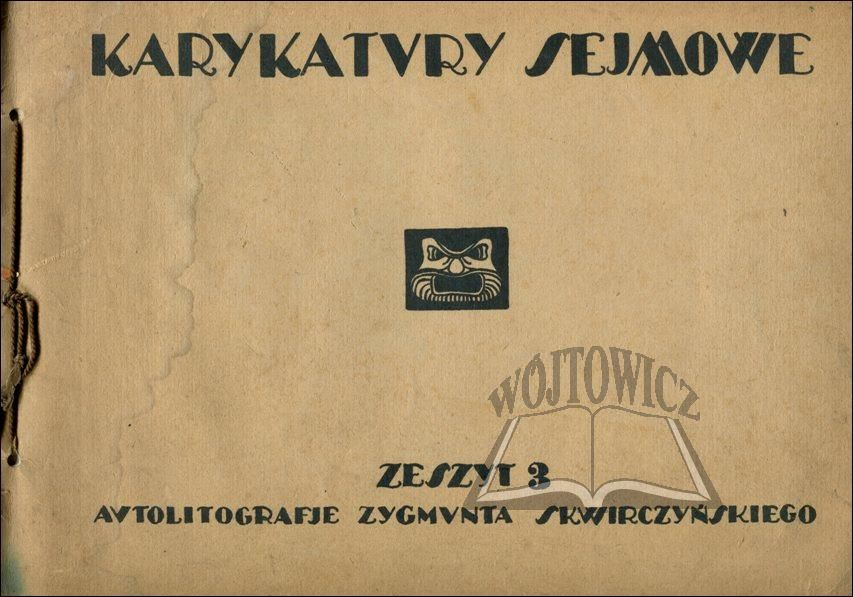 Zygmunt Skwirczyński Karykatury sejmowe 1920 cover